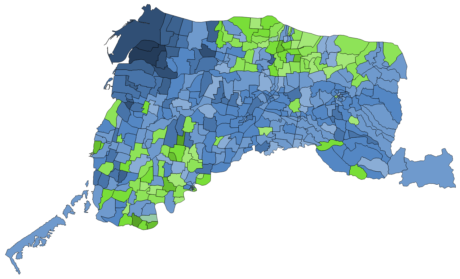 顏色對照表